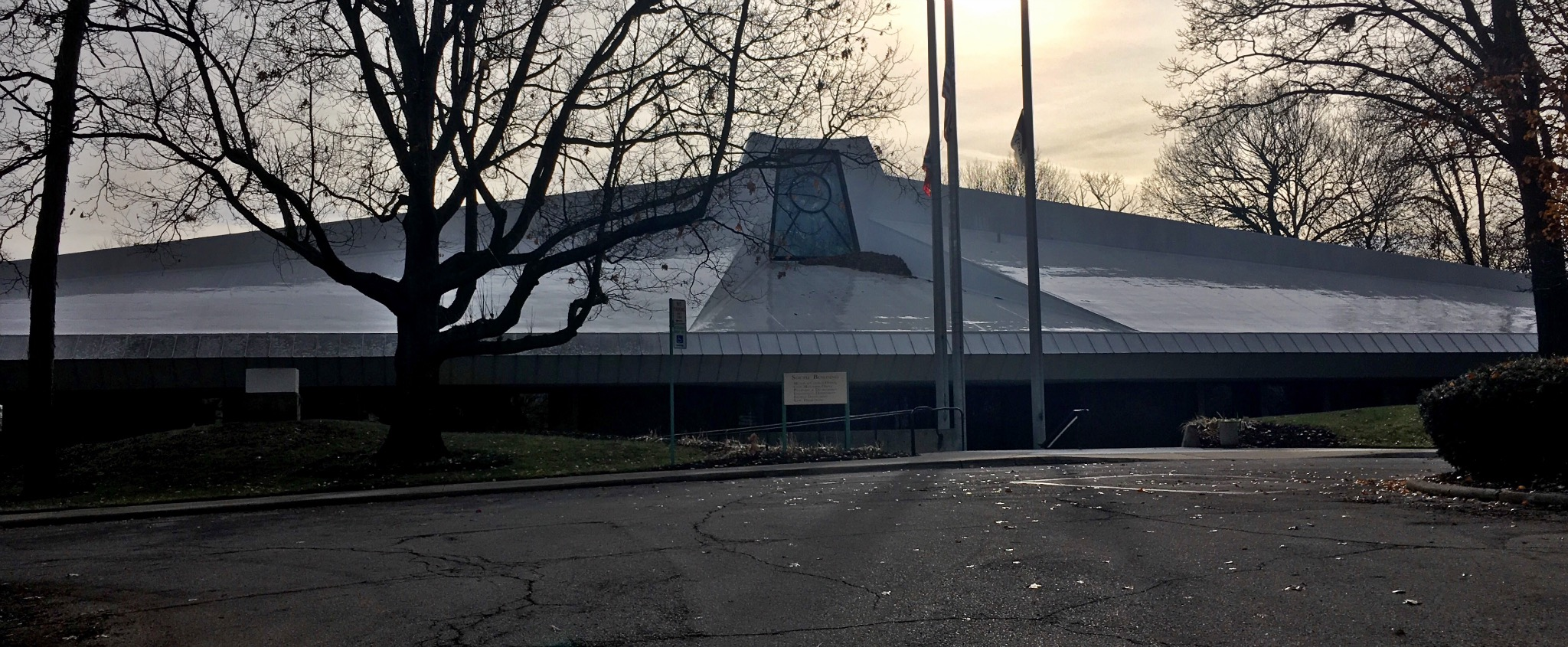 Kettering Government Center in 2015